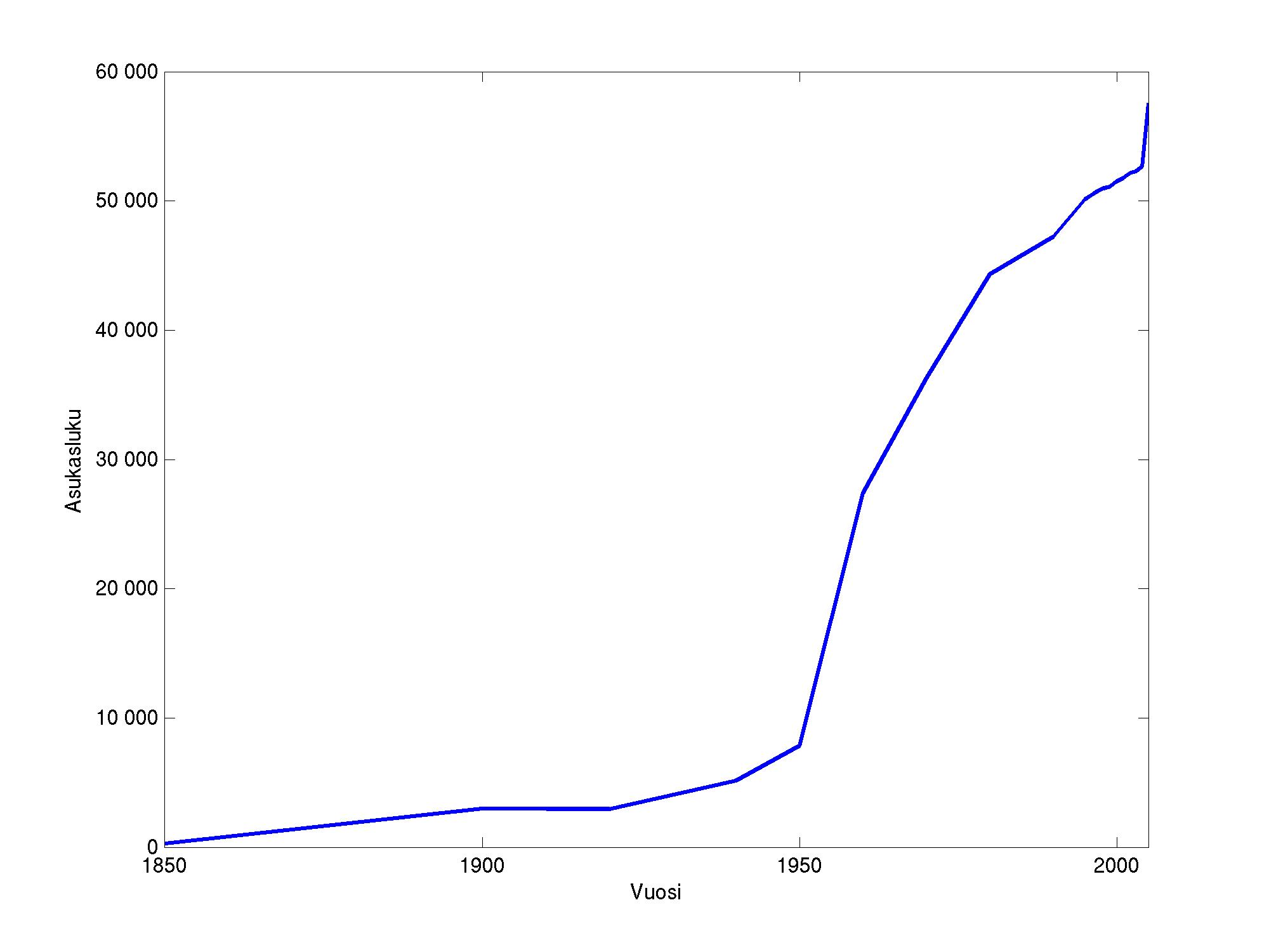 Joensuun väkiluvun kehitys 1985-2005